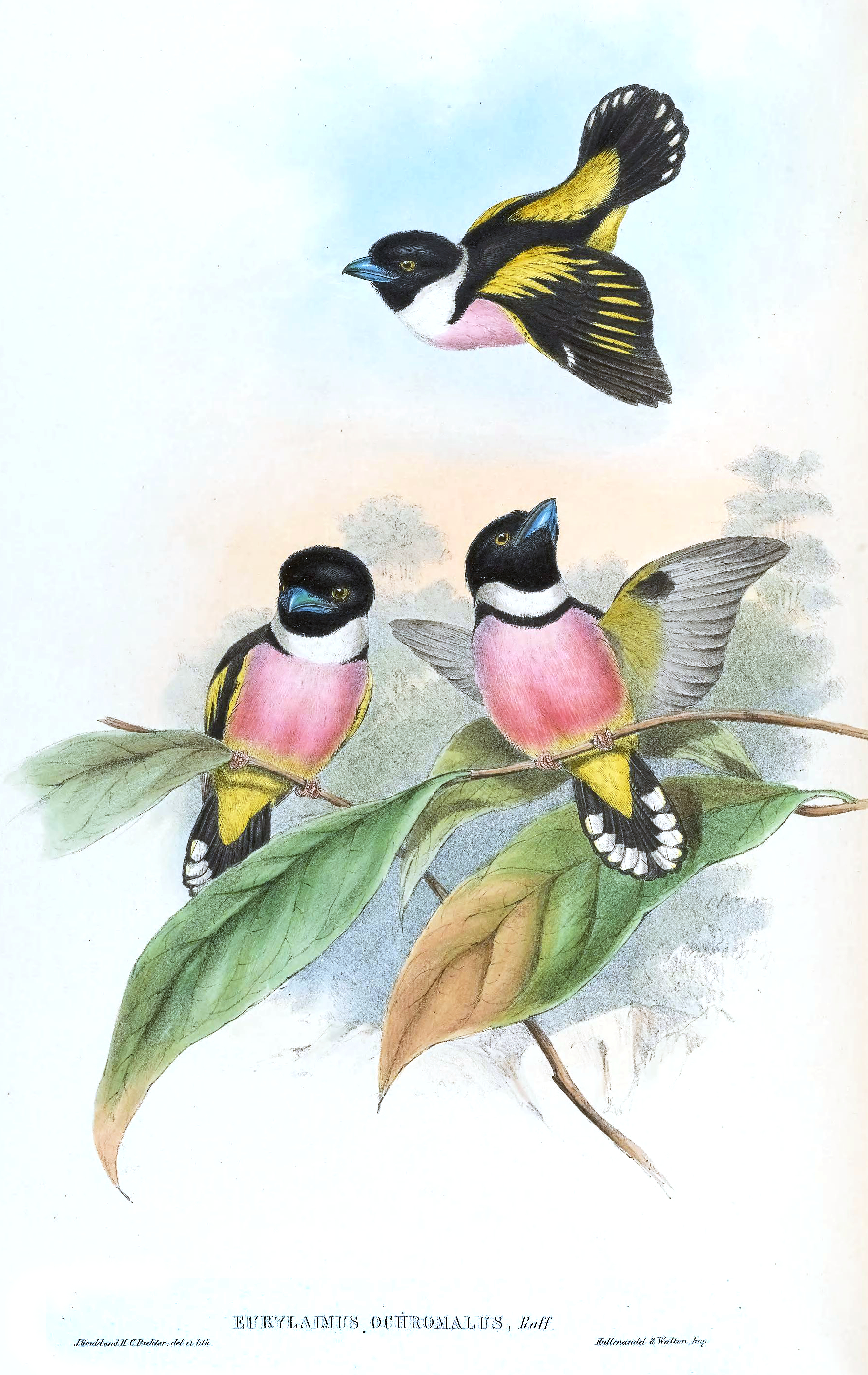 Eurylaimus ochrolamus